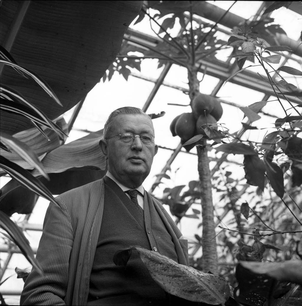 Direktor des Botanischen Gartens.